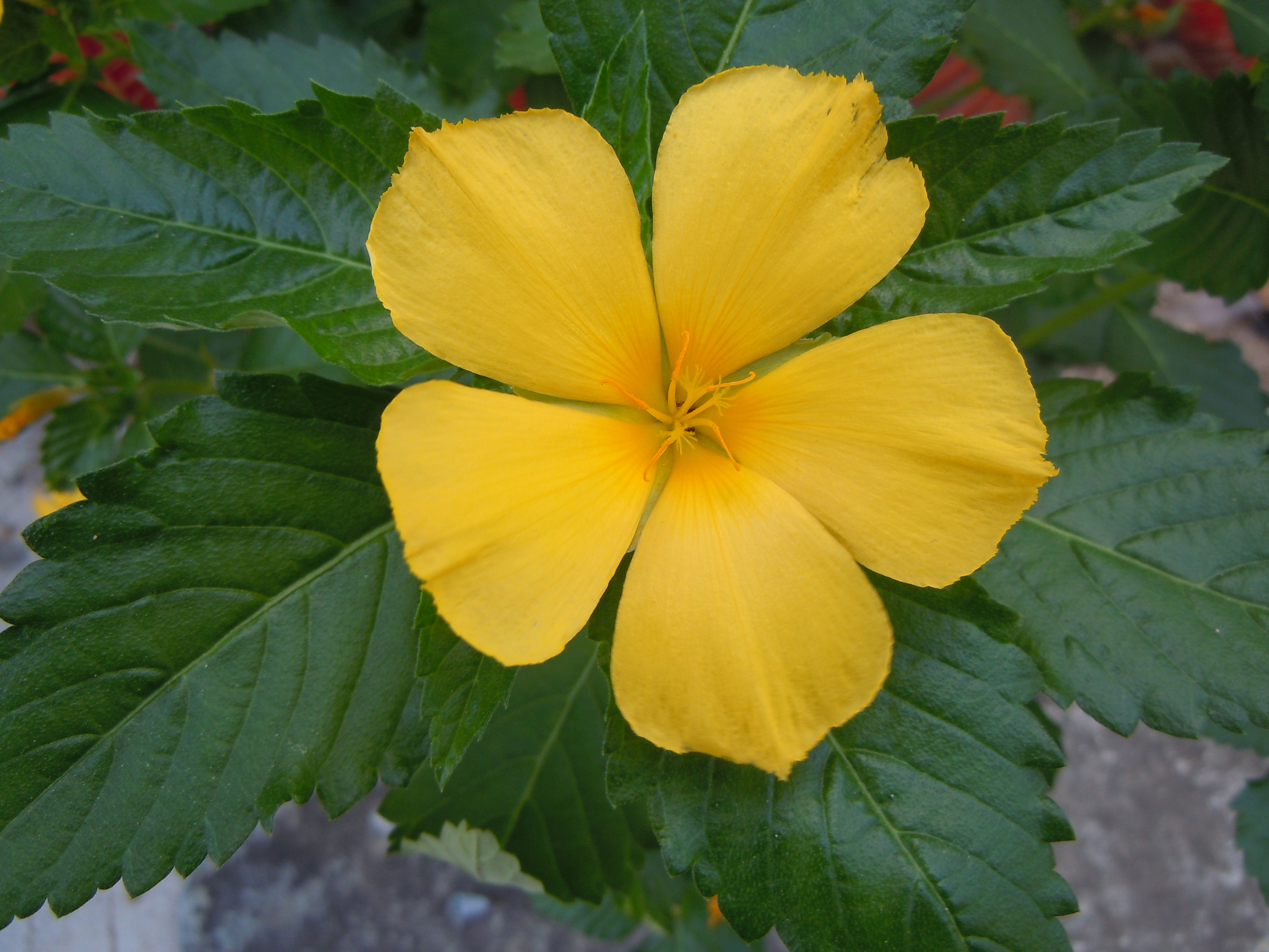 Turnera ulmifolia - Terre de Haut - Les Saintes View of the plant